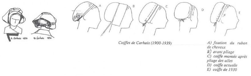 la coiffe de 1840 à 1940